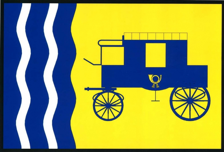 Flajka Nespek (okr. Benešov).